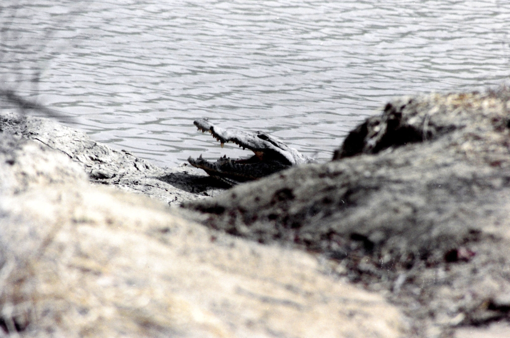 Krokodil an der Wasserstelle des Mole-Nationalparks (Ghana); fotografiert von Joerg Scherbaum (2002)